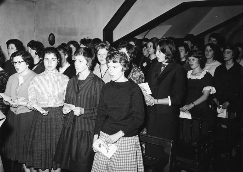 Klosterschule Nonnenwerth am Rhein